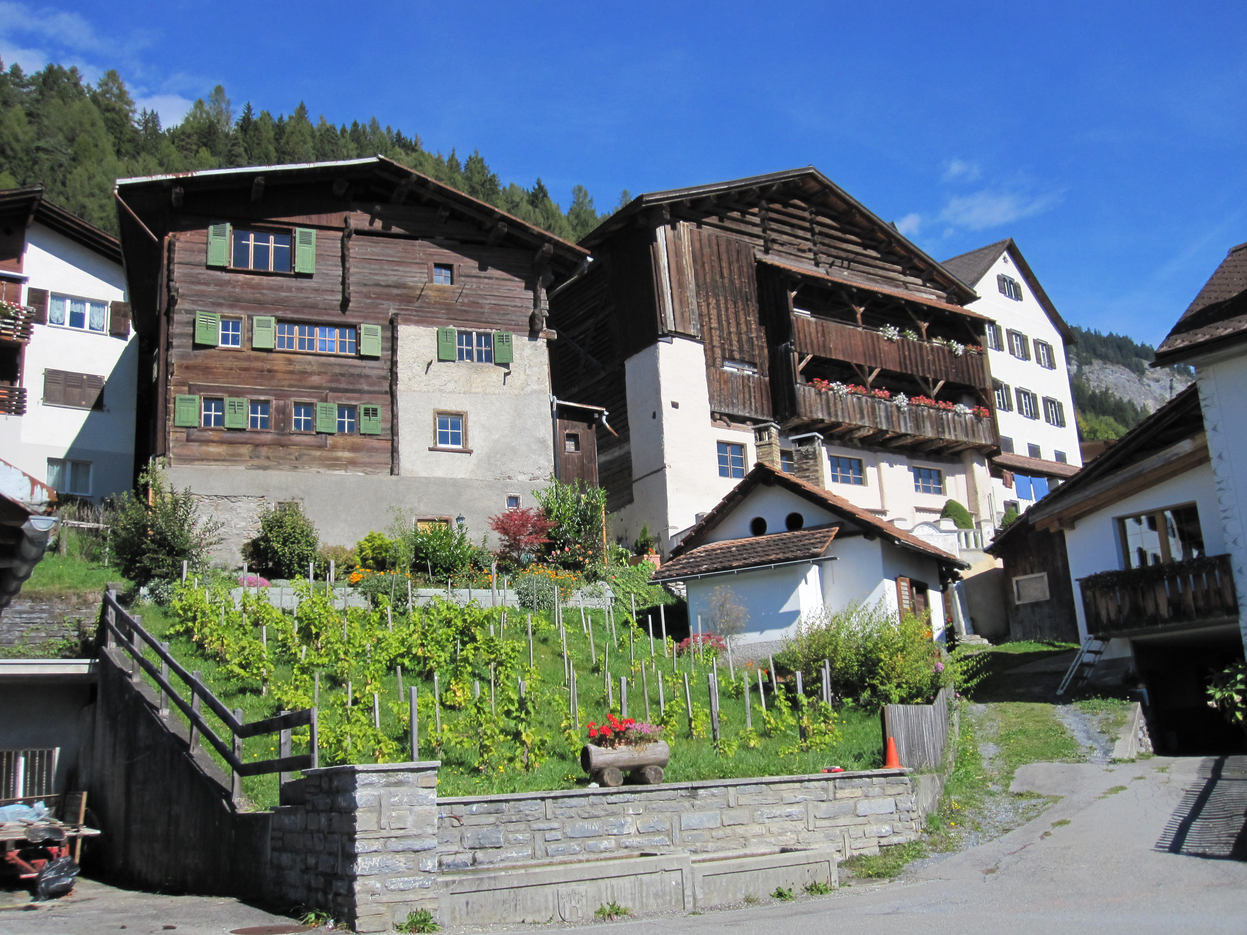 Weinreben in Trin (Kanton Graubünden)